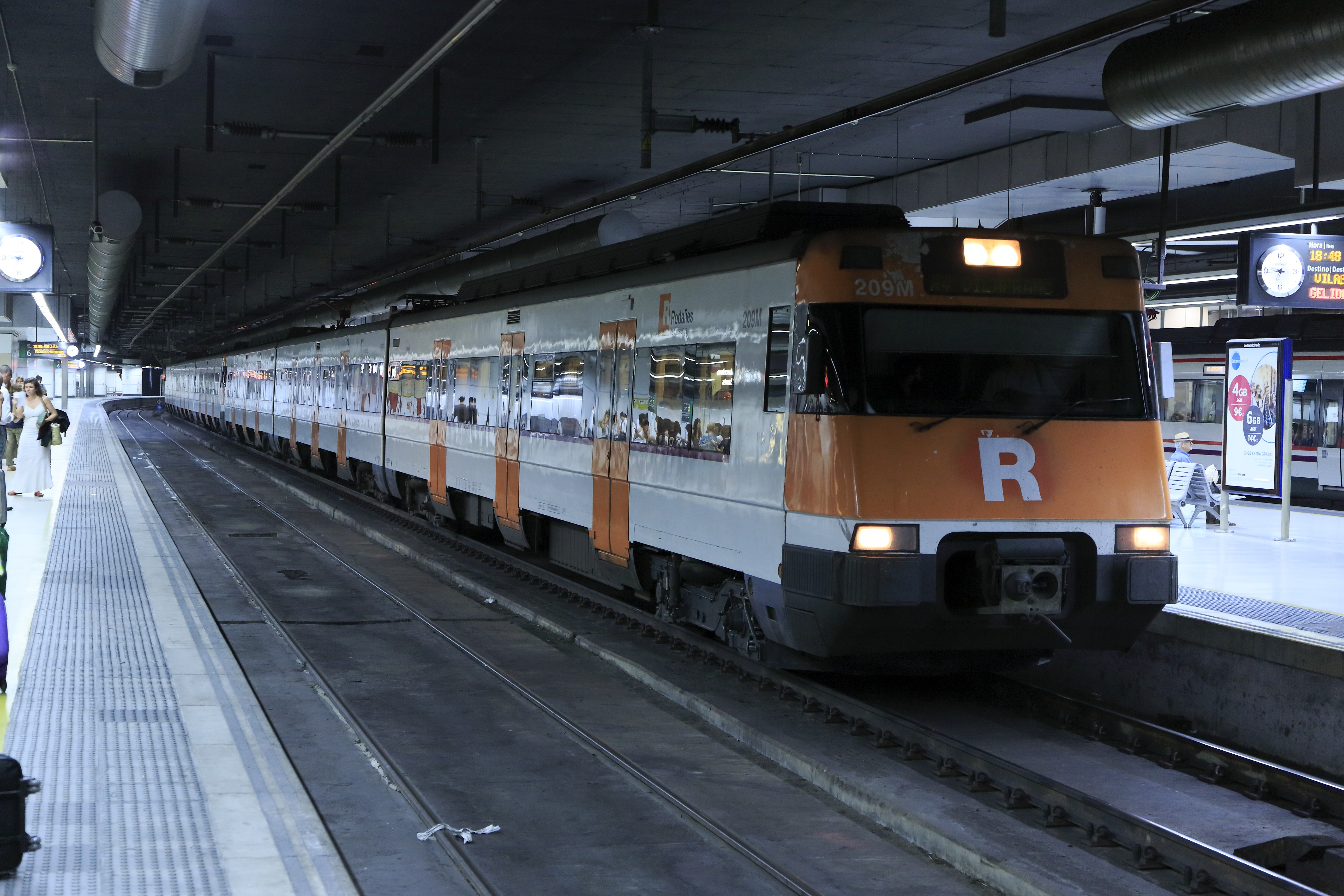 Doppelzug der Reihe 447 der S-Bahn von Barcelona im Bahnhof Barcelona-Sants auf dem nördlichsten Breitspurgleis 7. Das Gleis im Vordergrund mit den in Beton gelagerten Schienen ist das Regelspurgleis 6.